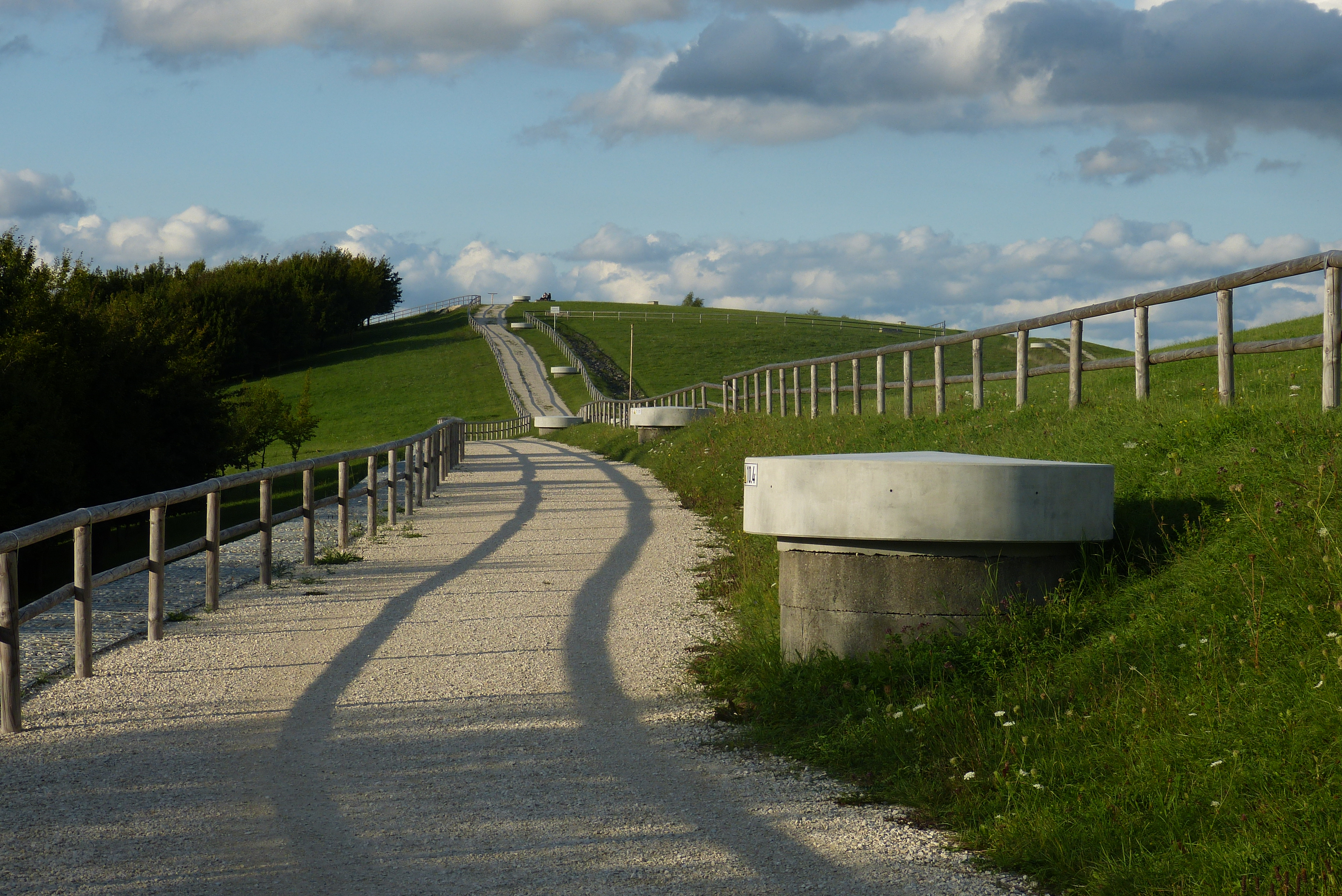 Augsburger Müllberg: Weg zum Gipfel und Gasbrunnen